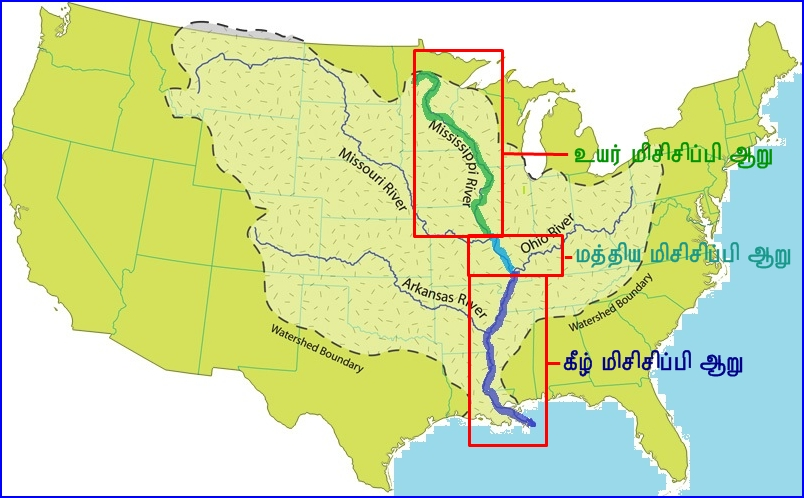 மிசிசிப்பி ஆற்றின் மூன்று முக்கிய பகுதிகள்